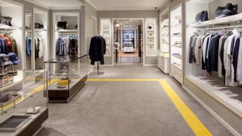 Santa Eulalia